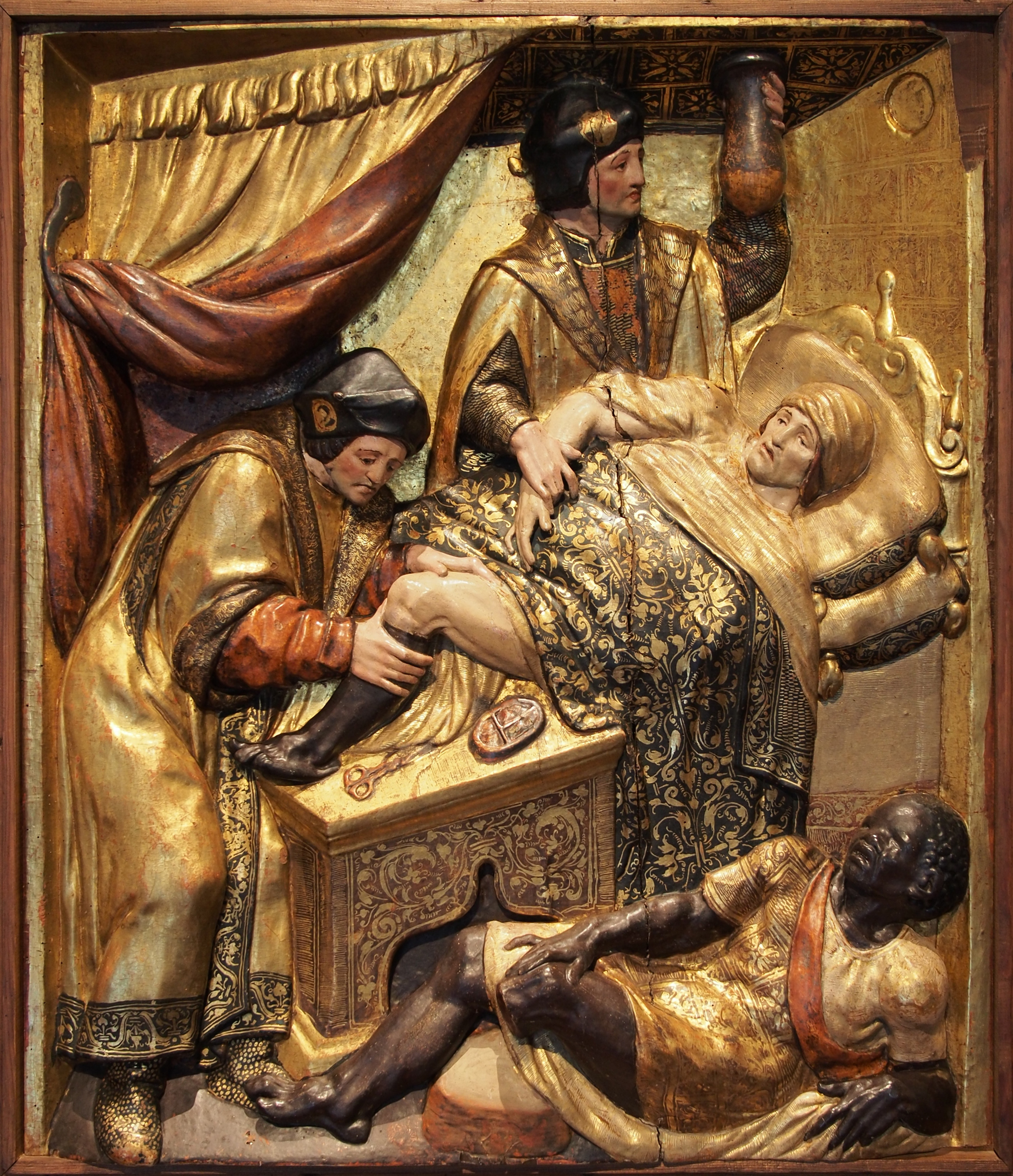 Milagro de la pierna trasplantada de San Cosme y San Damián. Isidro de Villoldo, c. 1547. Museo Nacional de Escultura, Valladolid.